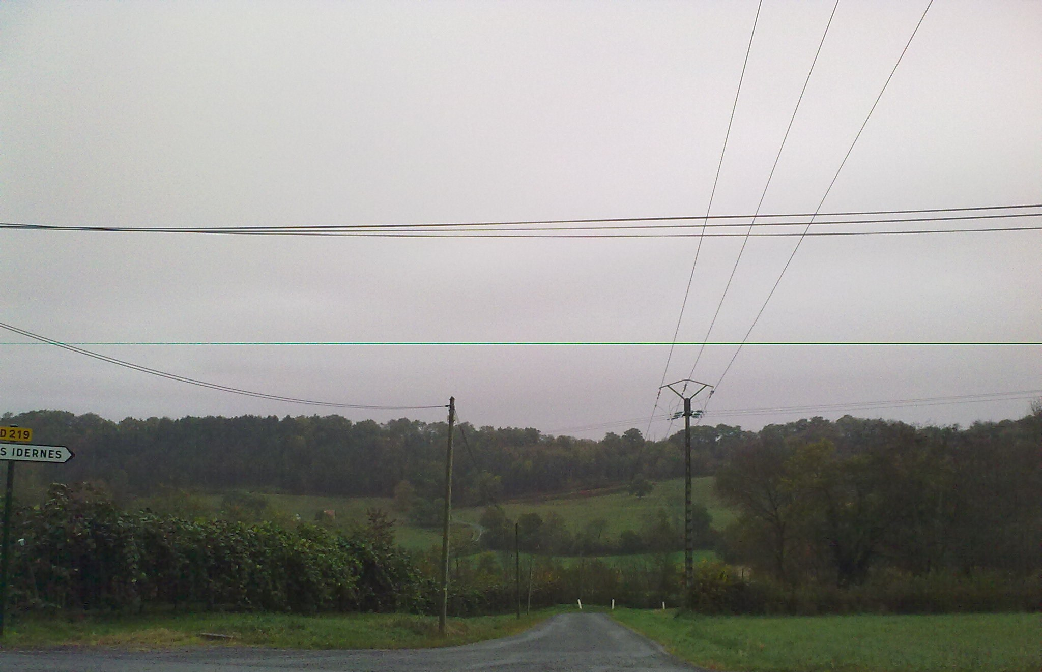 Cadillon